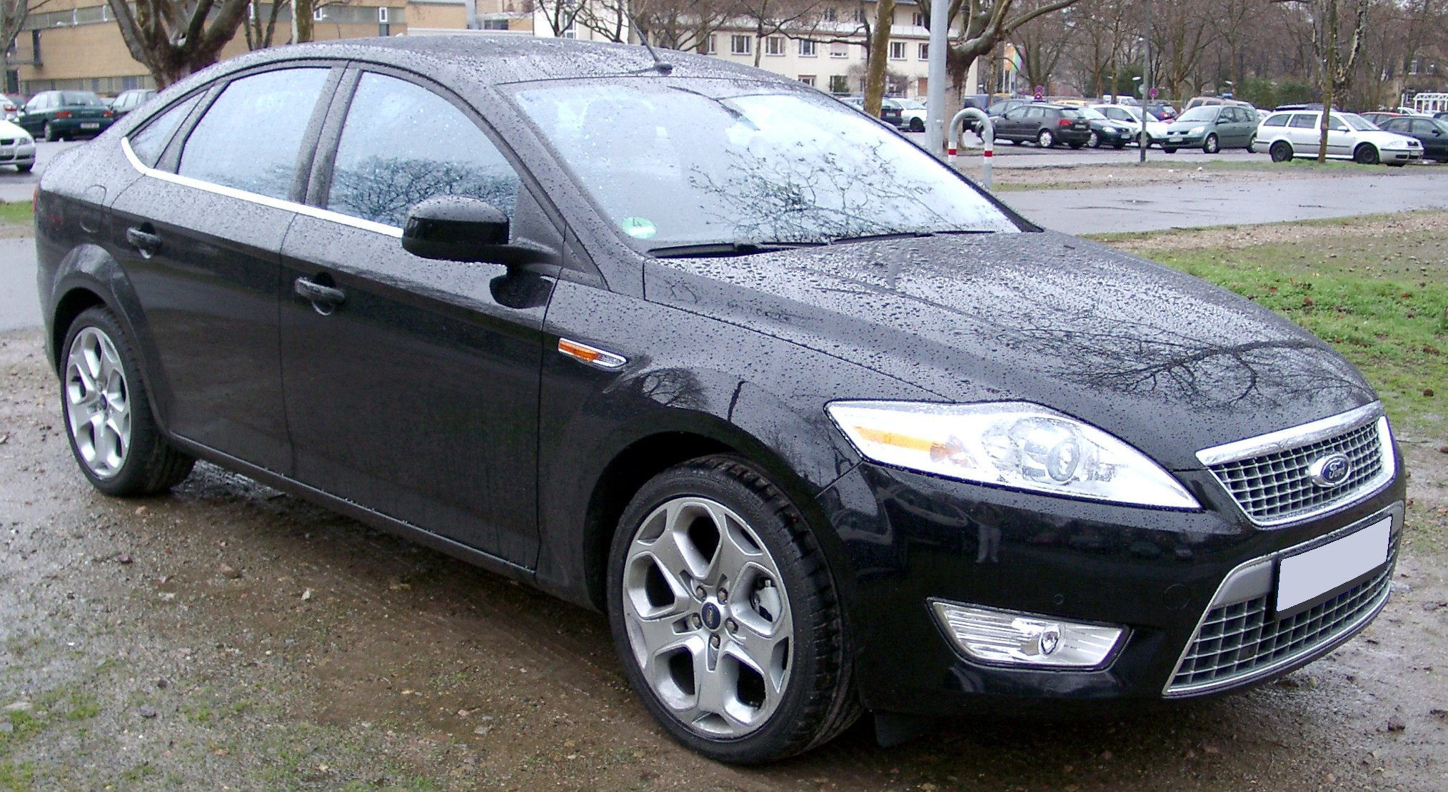 Ford Mondeo, 3. Generation